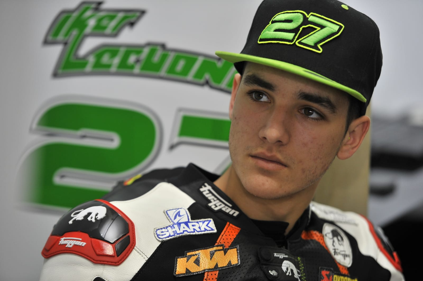 Iker Lecuona #27 - Phillip Island Grand Prix 2018